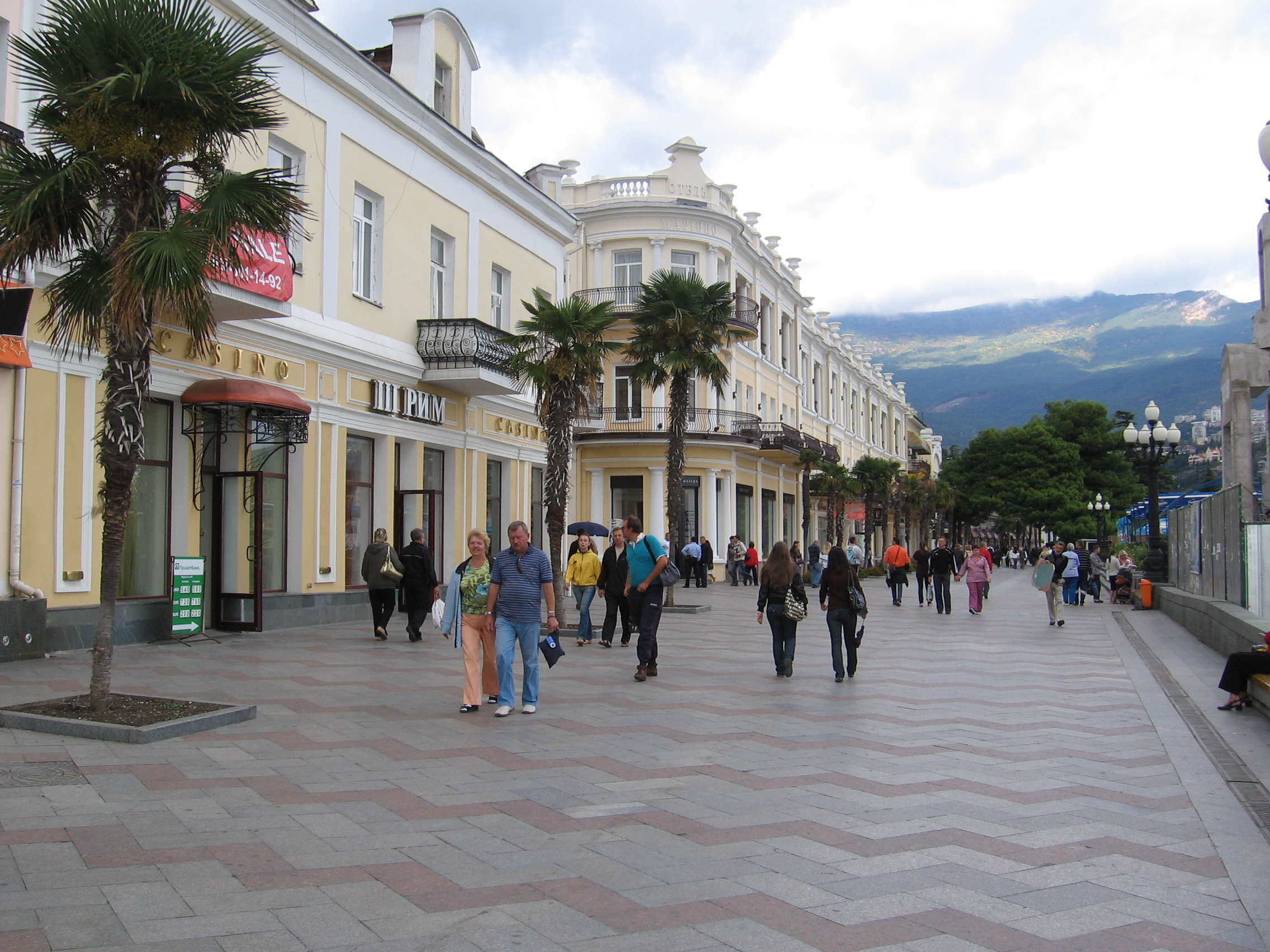 Набережная Ялты